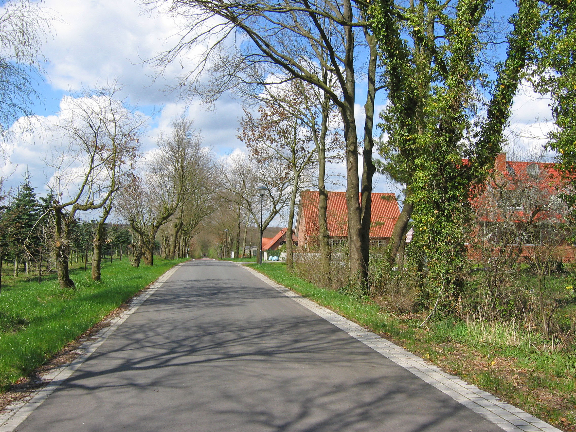 New developments in Bliedersdorf - Neubaugebiet "Unterer Daudiecker Weg"